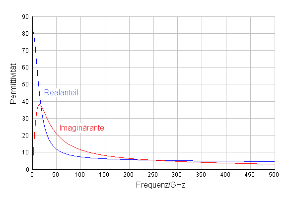 Frequenzabhängige Permittivität von Wasser (20 °C), mit Real- und Imaginäranteil